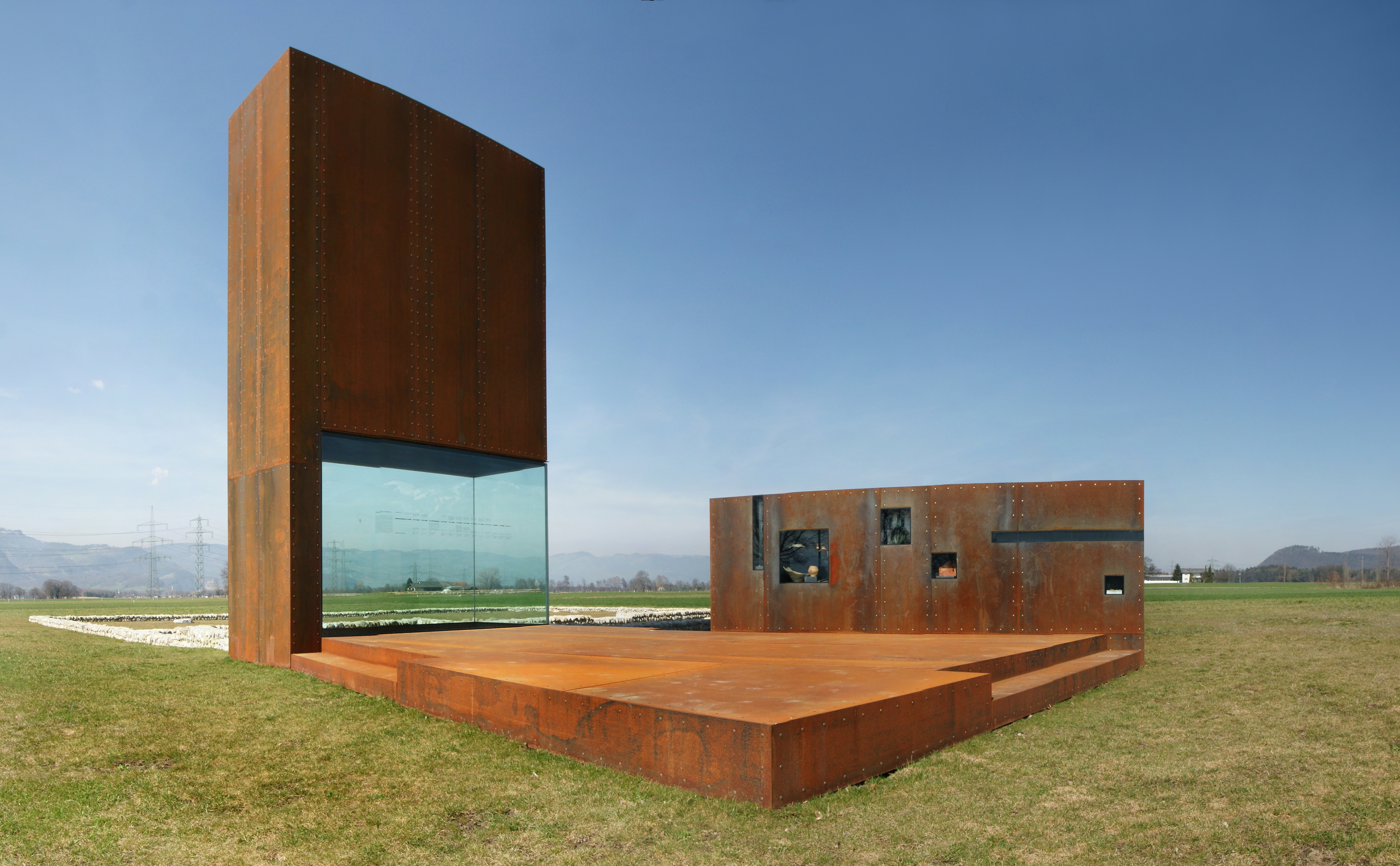 Das Freilichtmuseum "Römervilla" in Rankweil-Brederis. Die implantierte, begehbare Skulptur aus COR-TEN-Stahl stammt von Marte.Marte Architekten ZT Gmbh.